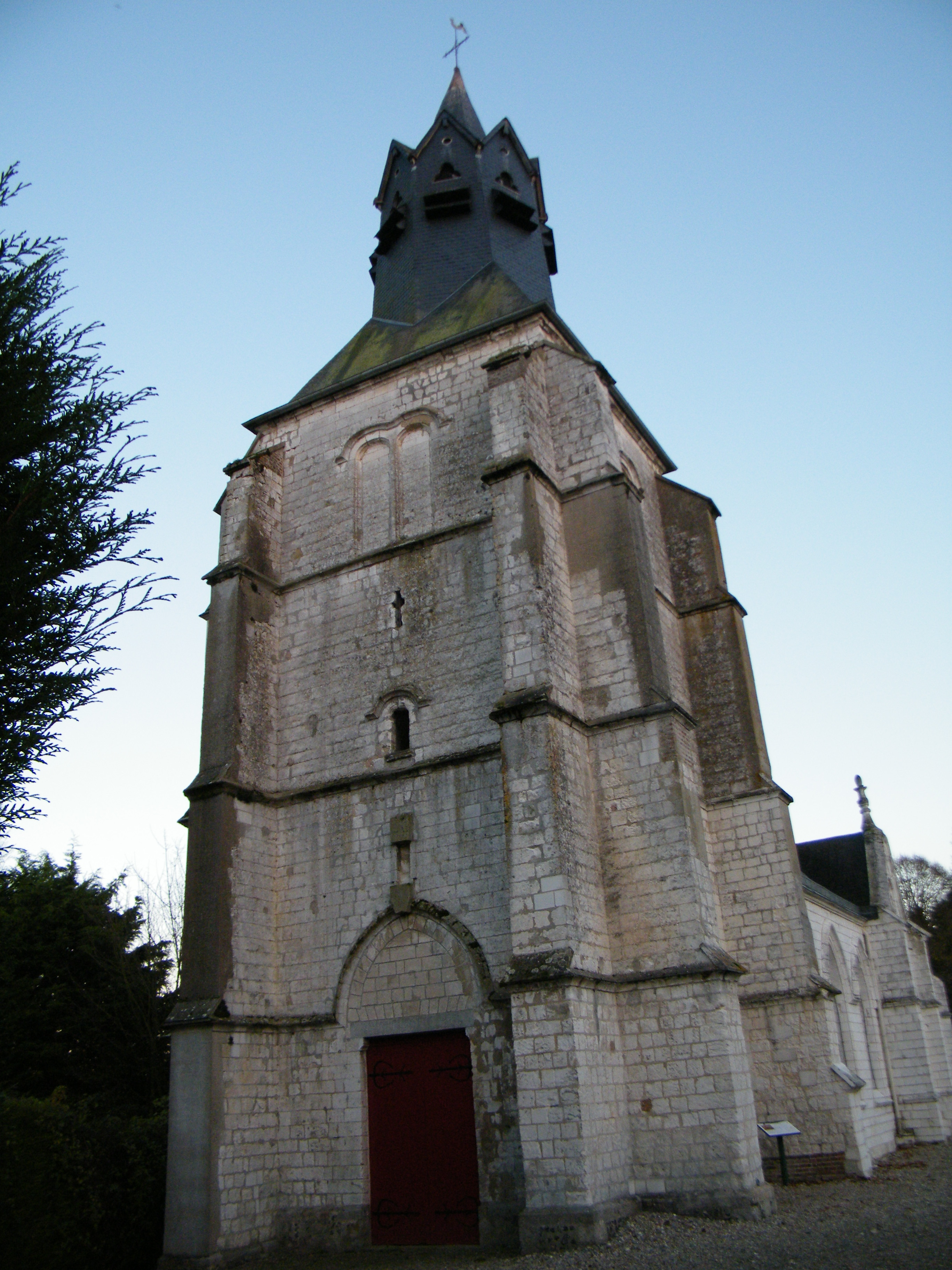 Commune : L'église, vouée à saint Antoine et à saint Denis.